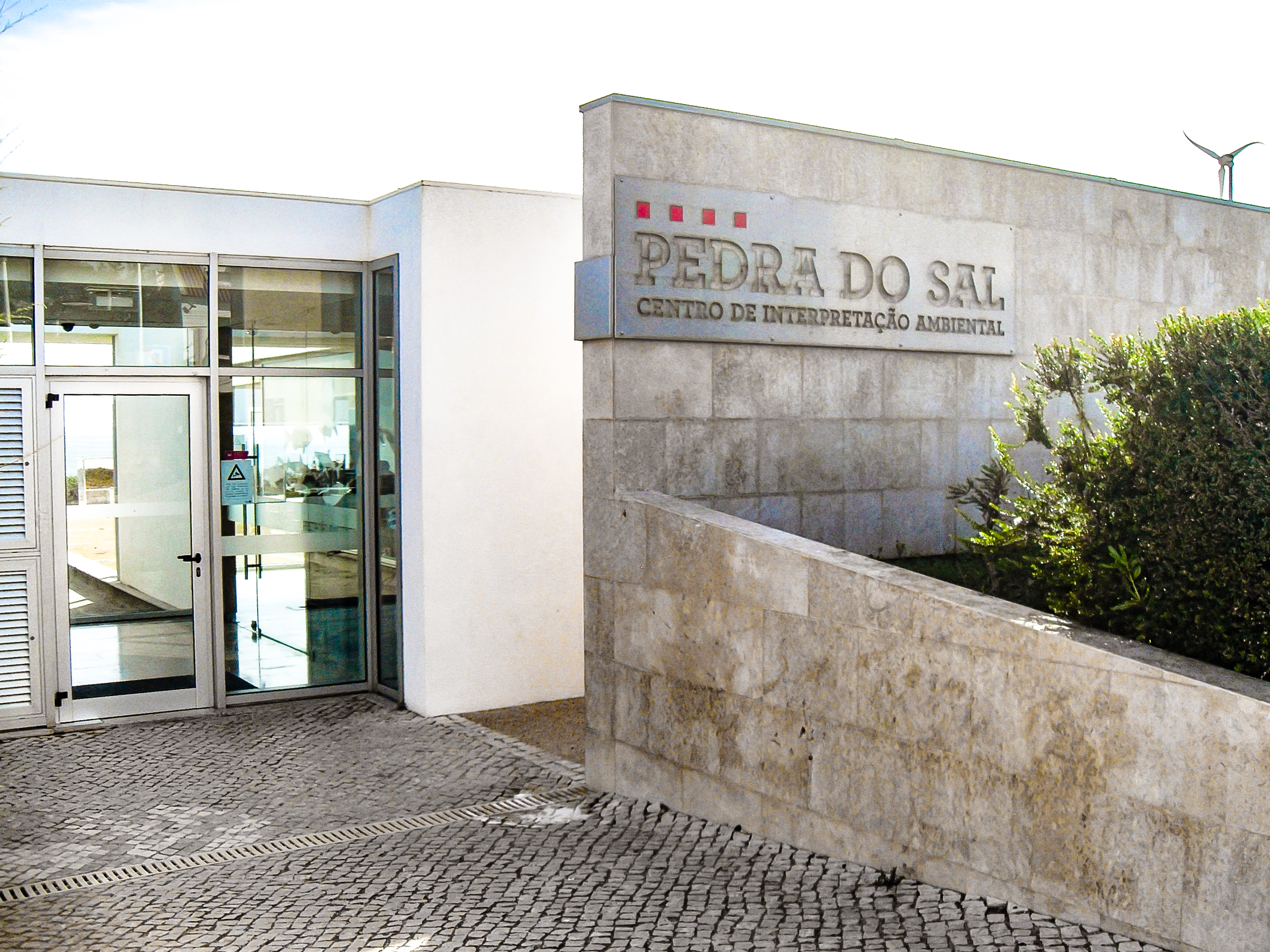 Entrada do CIAPS em São Pedro do Estoril.